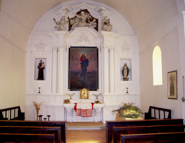 Interno Chiesa Sant'Antonio Abate Alberese (GR), foto 09/04/2006